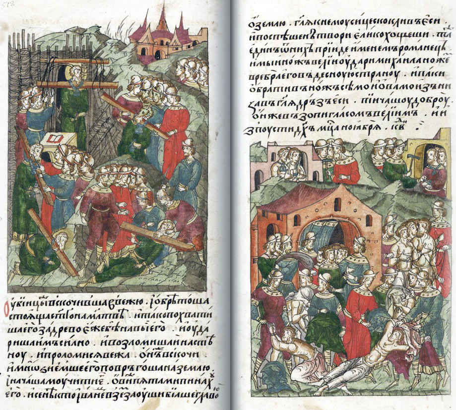 ЛИЦЕВОЙ ЛЕТОПИСНЫЙ СВОД Убийцы же вскочили в кибитку и обрели святого, стоящего на молитве. И так схватили его за деревянную колоду, которая было на щее его, и ударили его сильно, и взломали стену, и проломилась кибитка. Он же вскочил, и многие, схватив его, повергли на землю и начали мучить его, некие же ногами пинали его. И тогда некто Иванец, взяв за уши, бил его головою о землю, говоря к нему так: «Скоклив еси и поспешен, твори елико хощеши». Также один из них пришел, именем Романец, имея нож великий, и ударил Михаила ножом в ребра его, в правый бок, и вновь, обращая нож туда и обратно, пронзал его, говоря: «Дерзким (был) и пей чашу добрую ». Он же возопил громким голосом и испустил дух, месяца ноября 22-го дня.